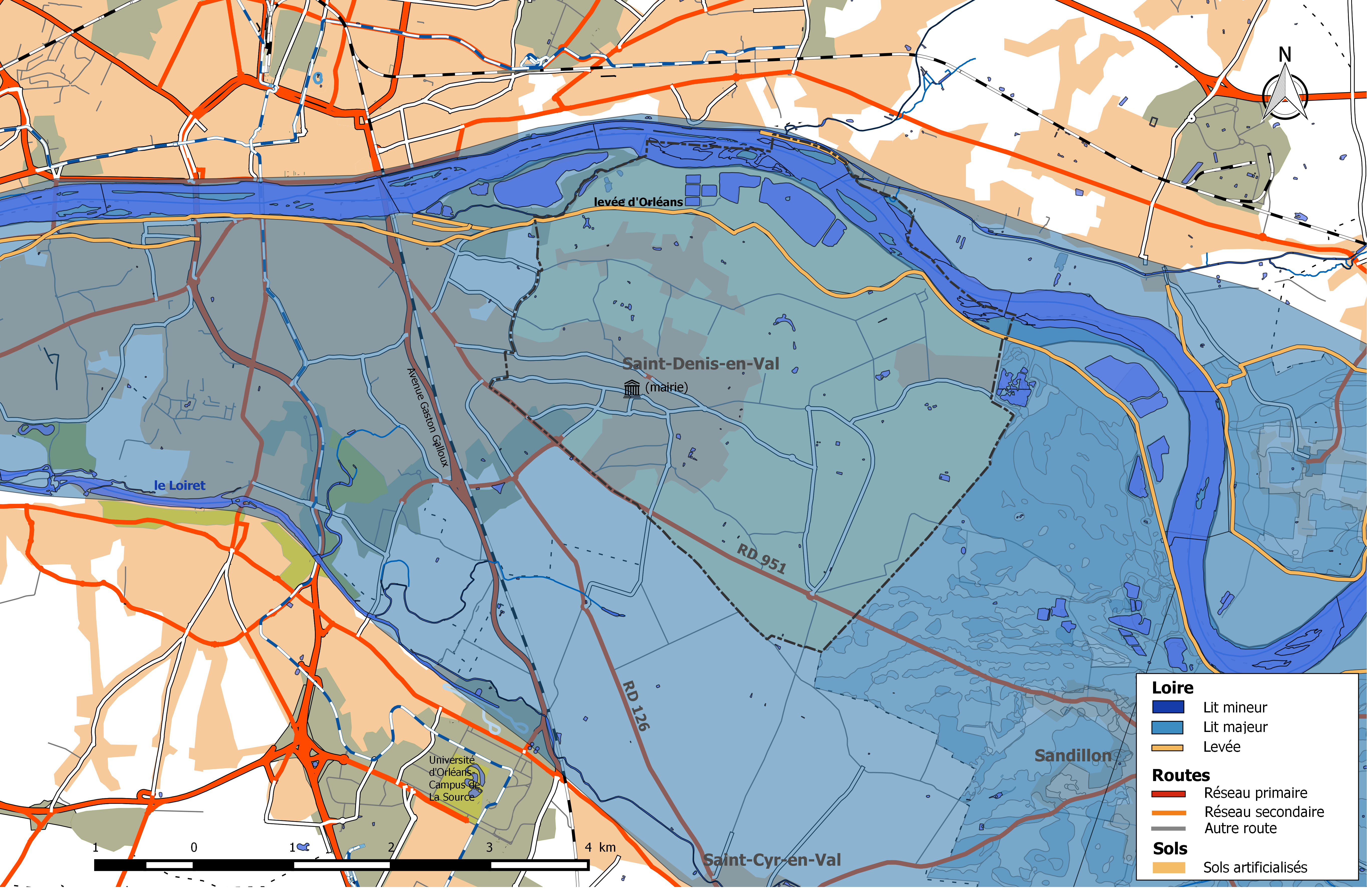 Zone inondable et réseaux hydrographique et routier de la commune de Saint-Denis-en-Val.